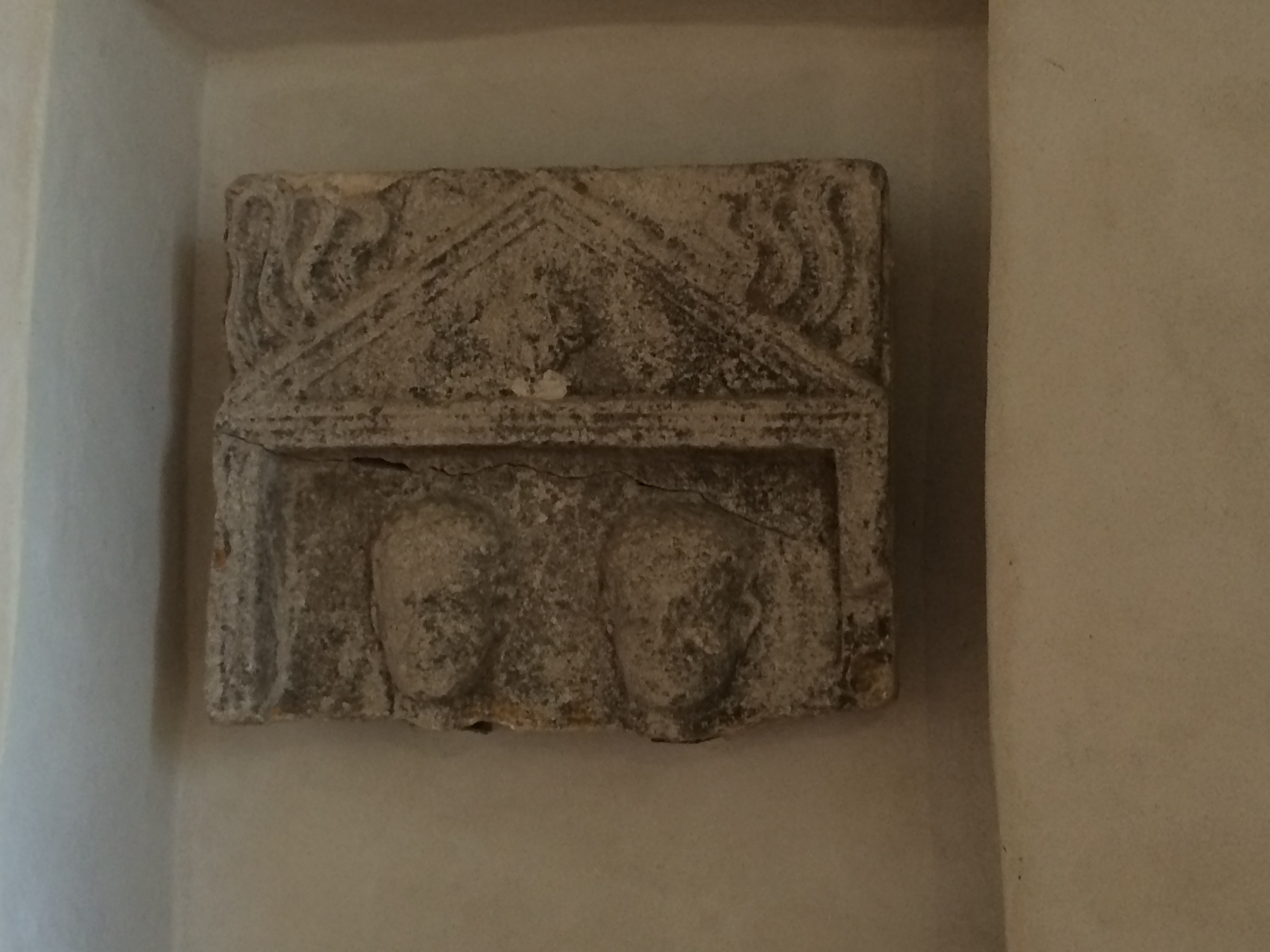 Fagagna-MadonnaTavella-Interno 09